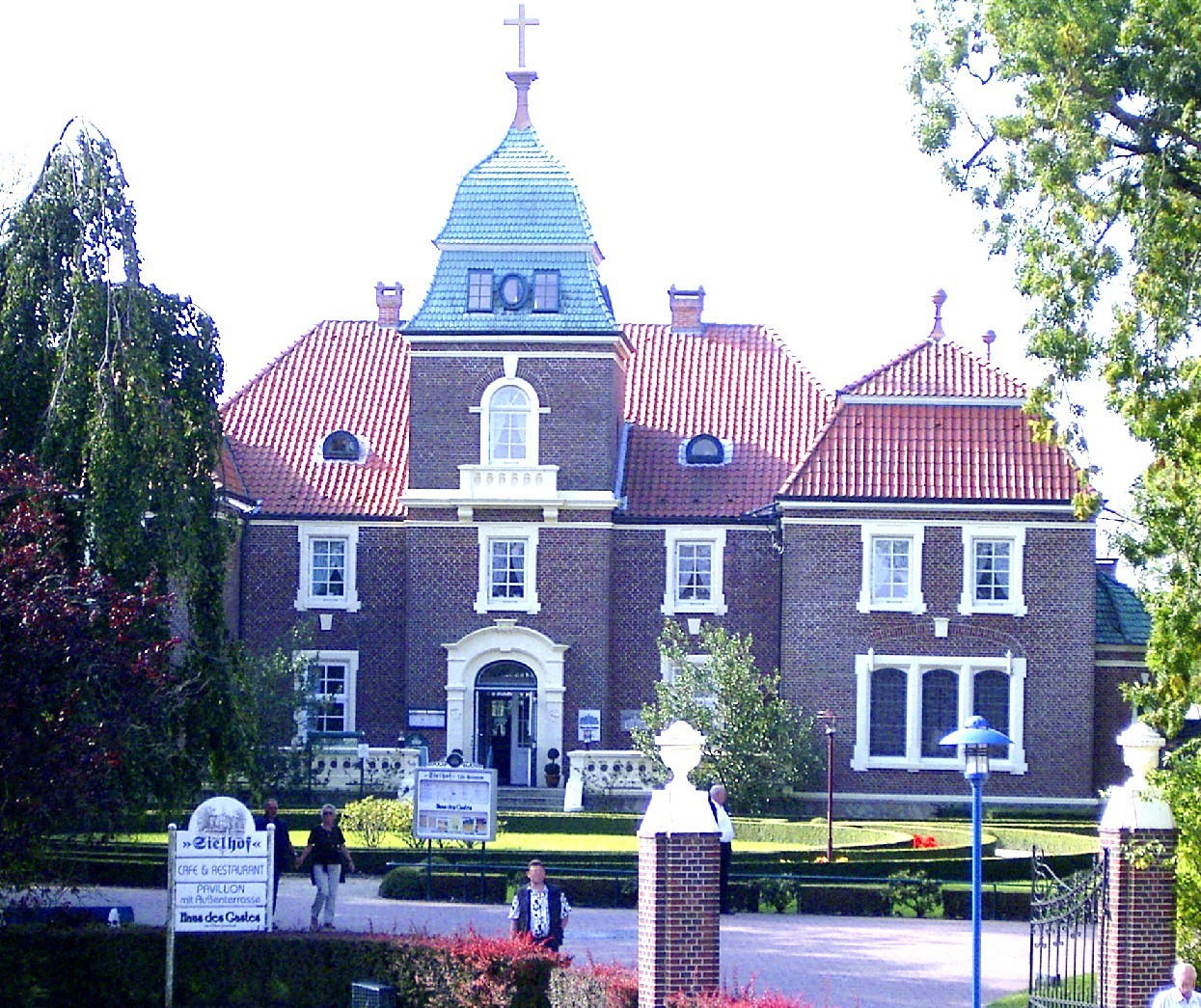 Ehemaliger Adelssitz "Sielhof" in Neuharlingersiel. Heute Cafe und Restaurant. Gelegen am Sieltief.